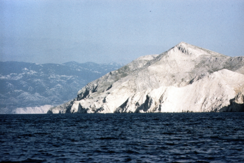 Goli otok, Croatia